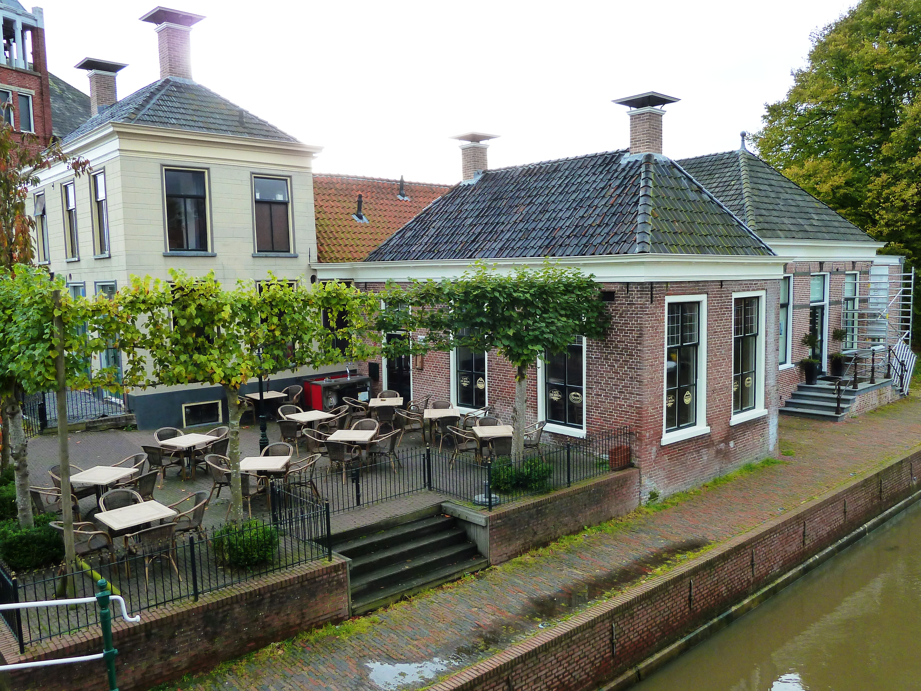 Hoofdstraat Winsum 2a en 2b (twee panden) in het Groningse dorp Winsum.